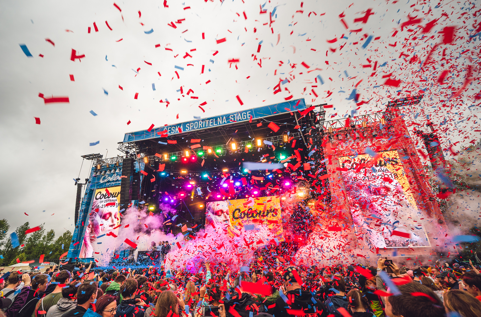 Siedemnasta edycja Colours of Ostrava